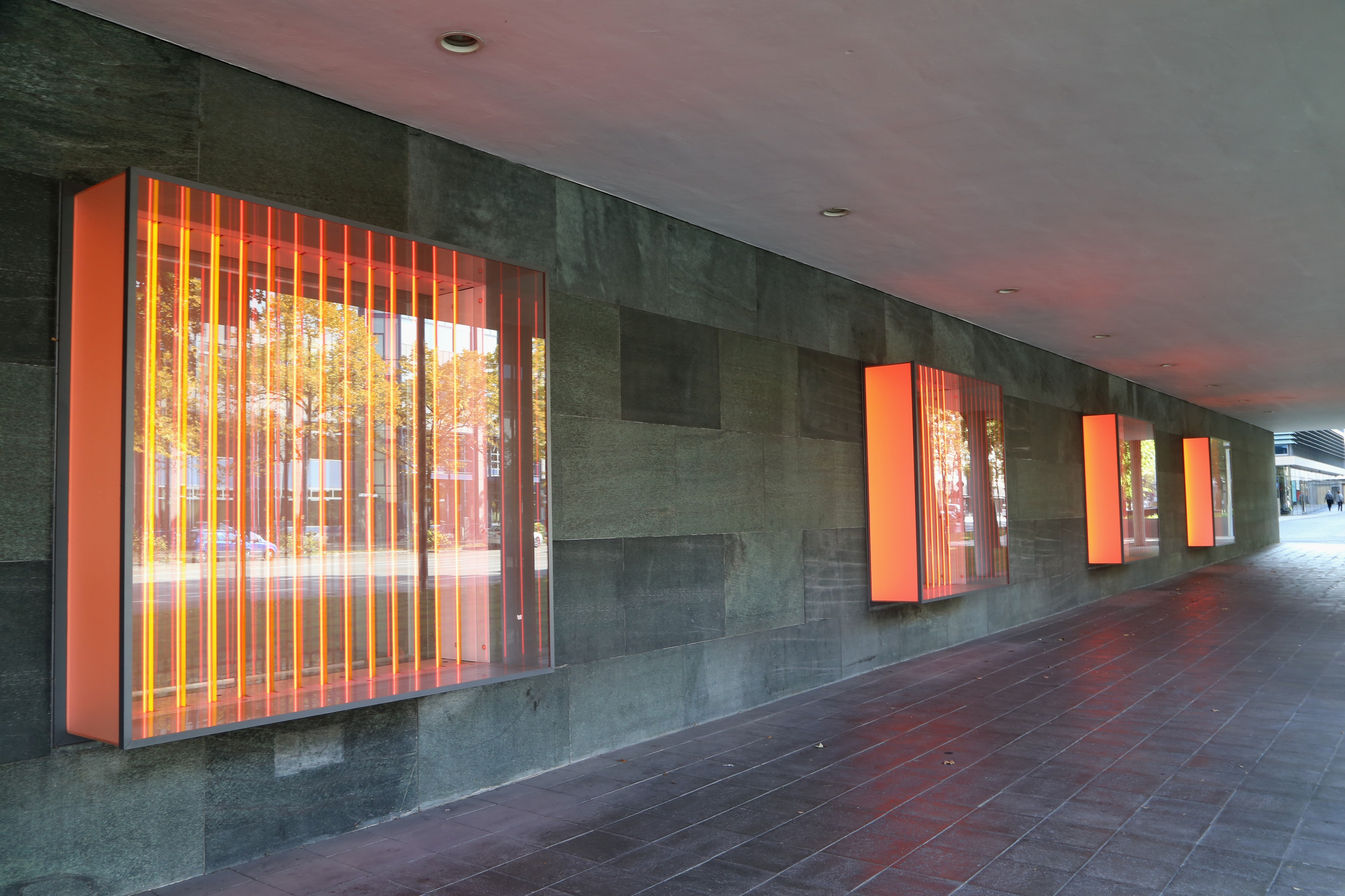 Lichtpartitur, Brigitte Kowanz, 2000/2001, Oskar-von-Miller-Ring 18, München